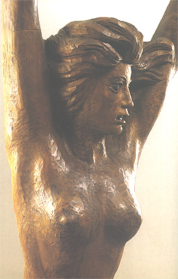 Vítězství